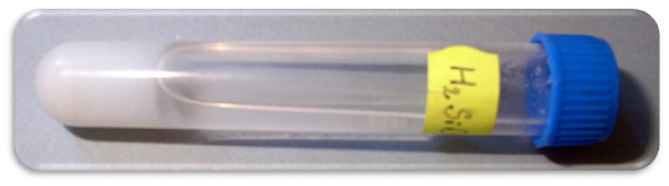 Kyselina křemičitá - H2SiO3